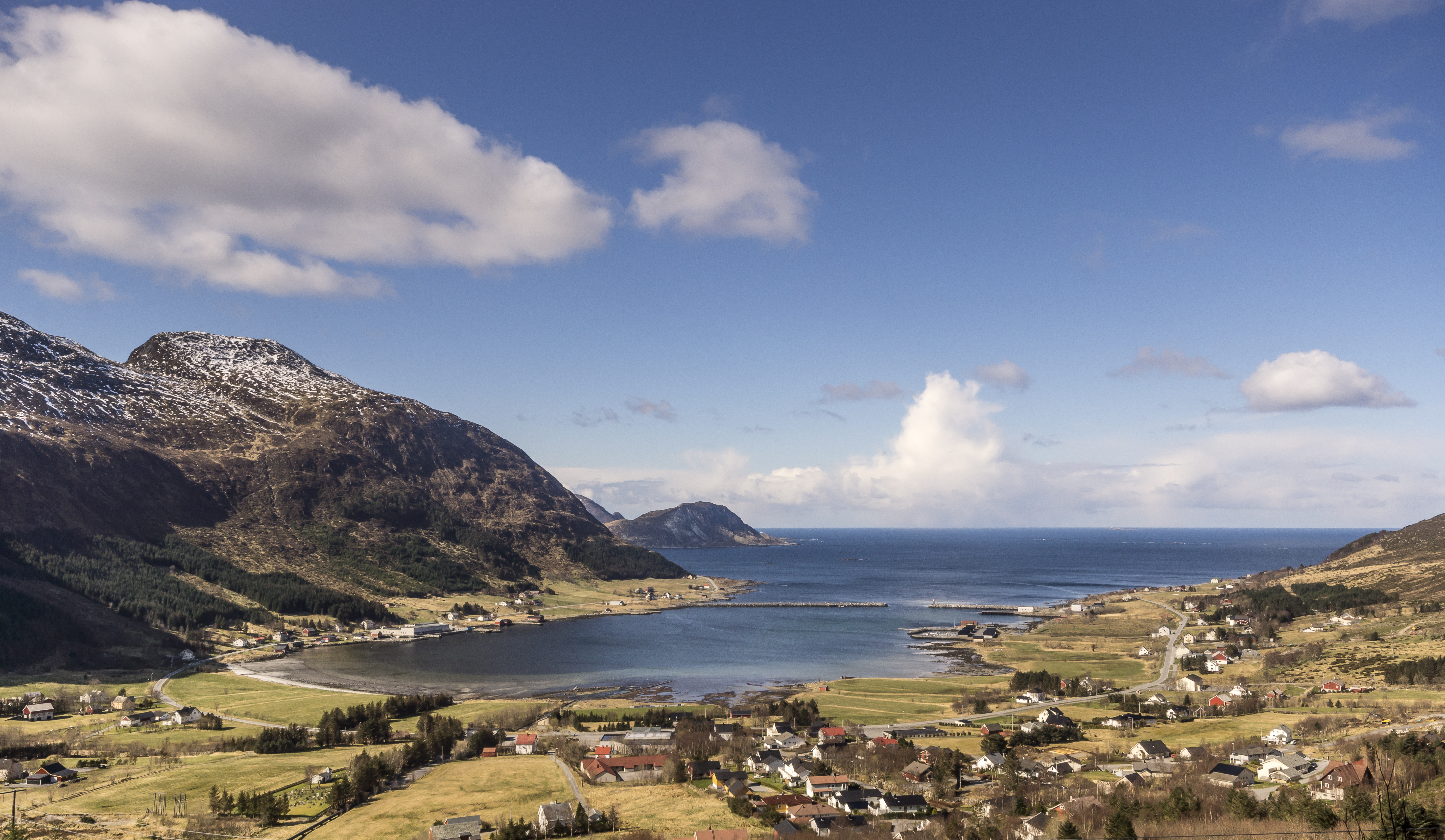 Gjerdsvika sett frå Kloven